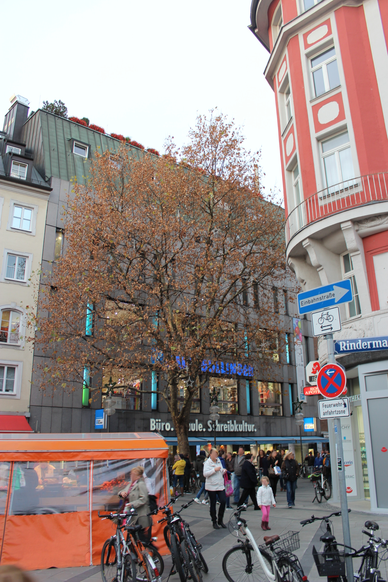 Kaut-Bullinger, München, November 2015